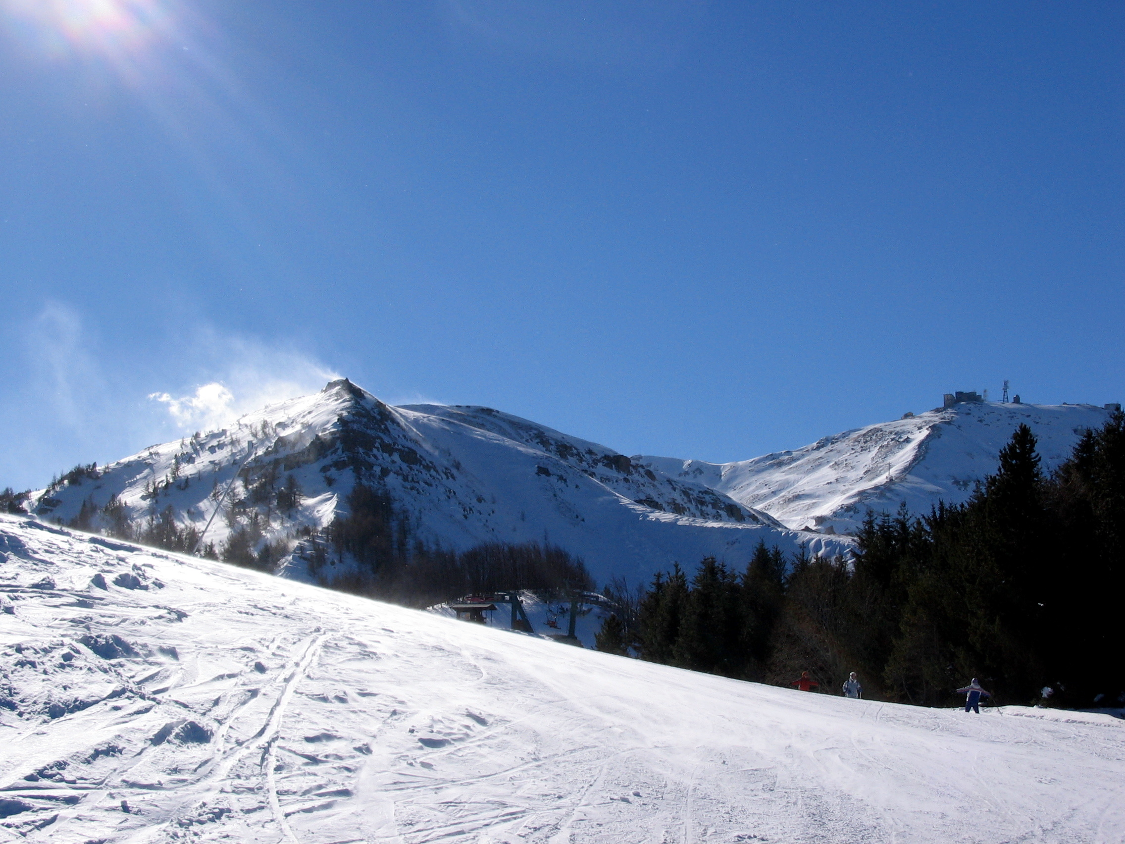 Monte Cimone, Appennini, Italy. La cresta di gallo d'inverno.